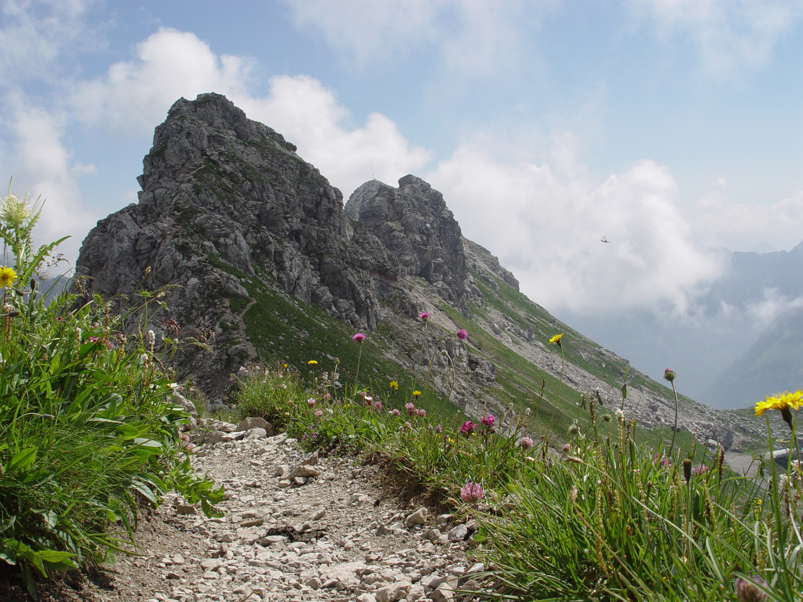 Zustieg vom Nebelhorn zum Hindelanger Klettersteig mit Westlichem Wengenkopf (2235 m).